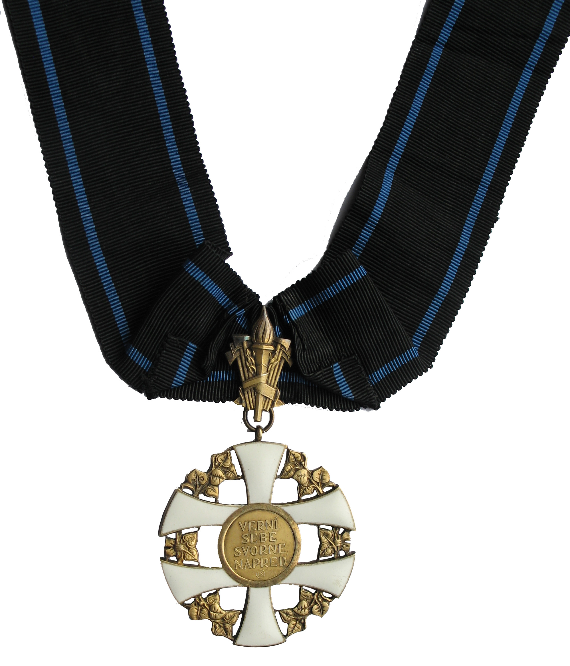 Reverz Veliteľského kríža Radu Slovenského kríža vojnovej Slovenskej republiky založeného v roku 1940